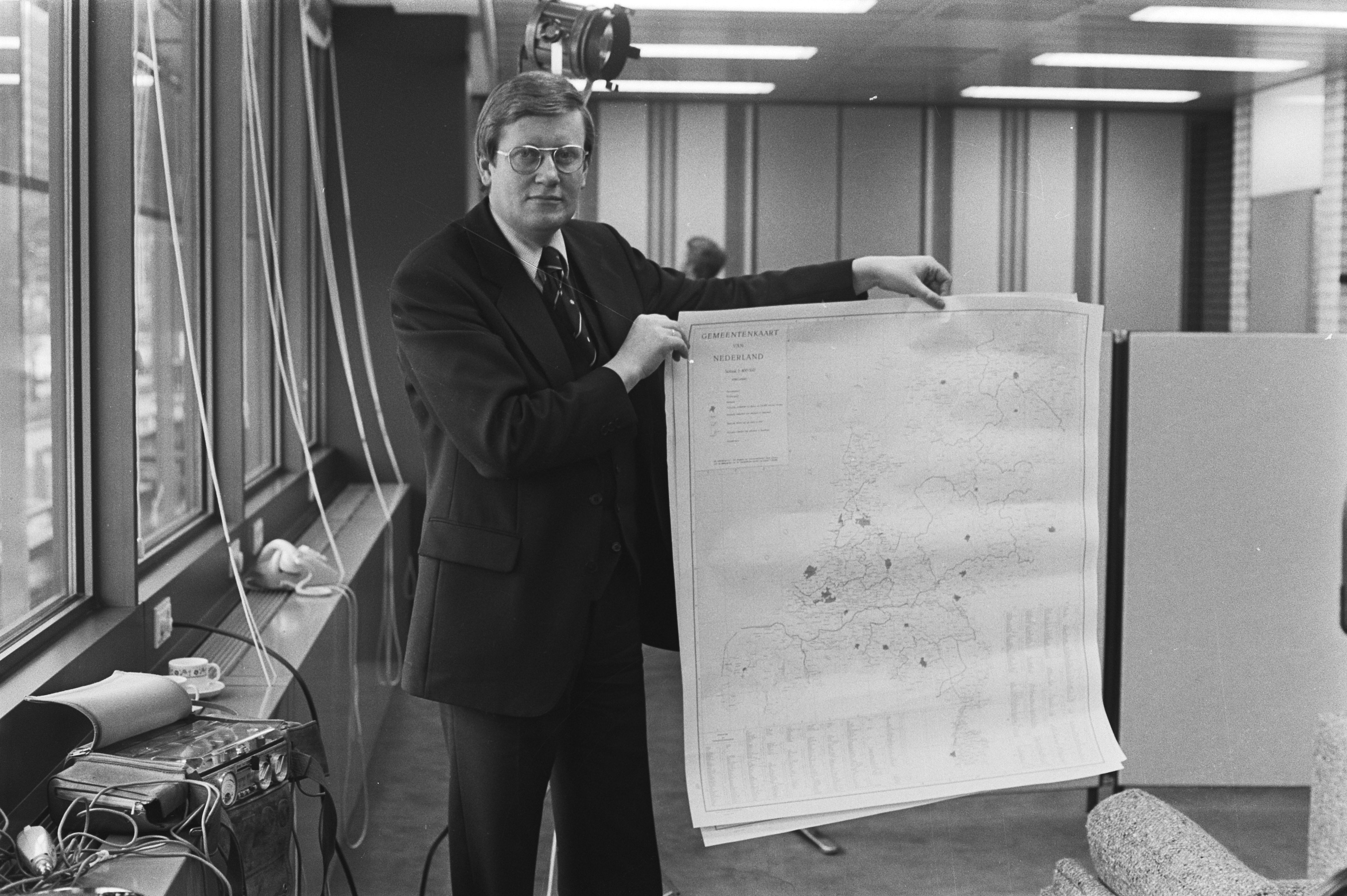 Collectie / Archief : Fotocollectie Anefo Reportage / Serie : Minister Wiegel (BZ) presenteert bestuurlijke herindeling van ons land Beschrijving : Minister Wiegel met kaart volgens nieuwe indeling Datum : 25 mei 1978 Trefwoorden : Infolandkaarten, ministers, politiek Persoonsnaam : Wiegel, Hans Fotograaf : Peters, Hans / Anefo Auteursrechthebbende : Nationaal Archief Materiaalsoort : Negatief (zwart/wit) Nummer archiefinventaris : bekijk toegang 2.24.01.05 Bestanddeelnummer : 929-7403